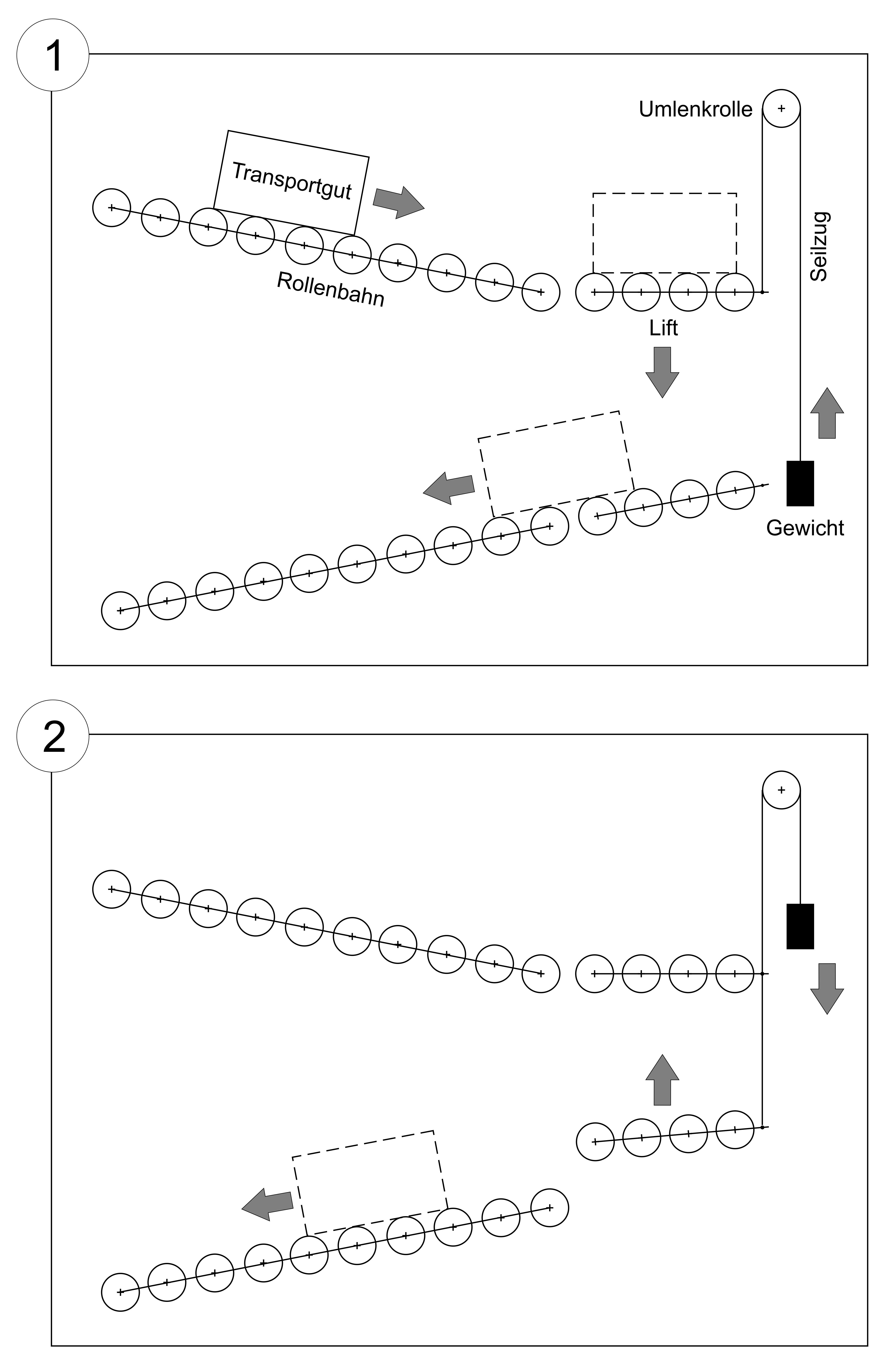 (1) Das Transportgut rollt auf einer schiefen Ebene, die als Rollenbahn ausgeführt ist, auf einen Lift. Durch das Gewicht des Transportguts wird der Lift nach unten bewegt, während gleichzeitig ein Gegengewicht nach oben gezogen wird. (2) Sobald das Transportgut den Lift auf der unteren Ebene über eine weitere Rollenbahn verlassen hat, zieht das Gegengewicht den Lift wieder nach oben.